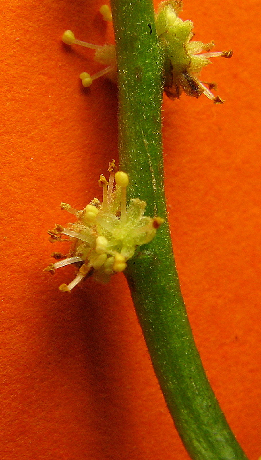 Staminate inflorescence.